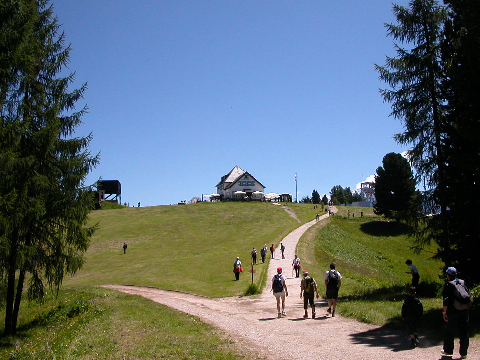 Rifugio Ciampedie, 1998m